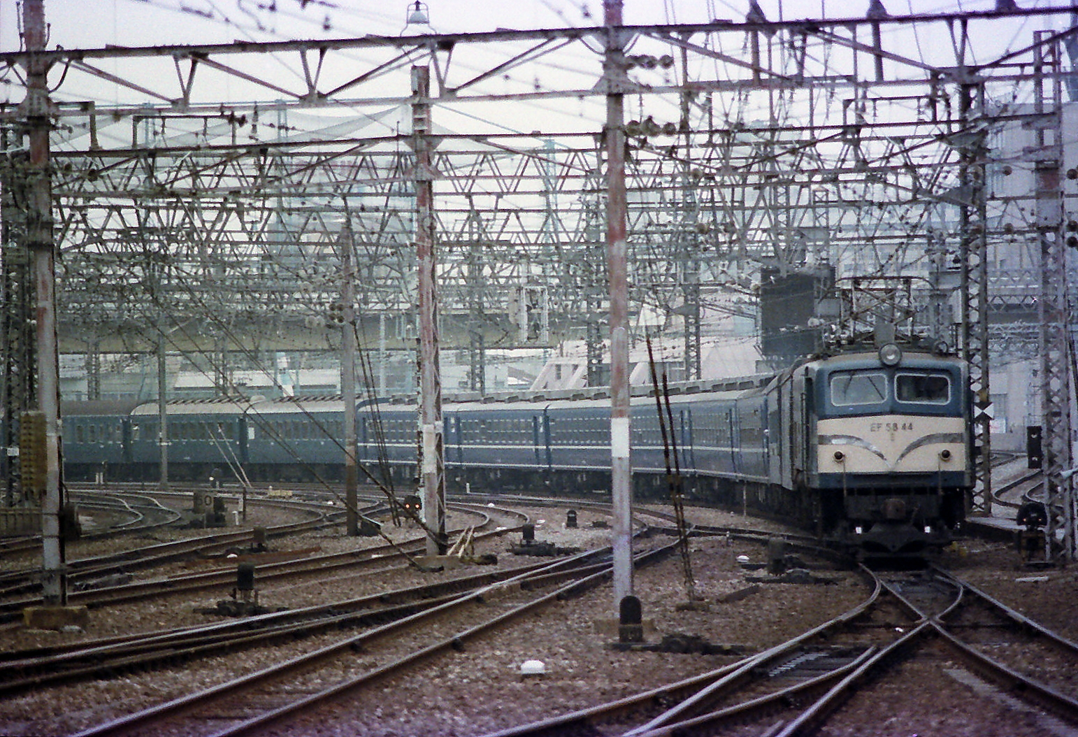 寝台急行 きたぐに (列車) 東海道本線 新大阪駅-大阪駅